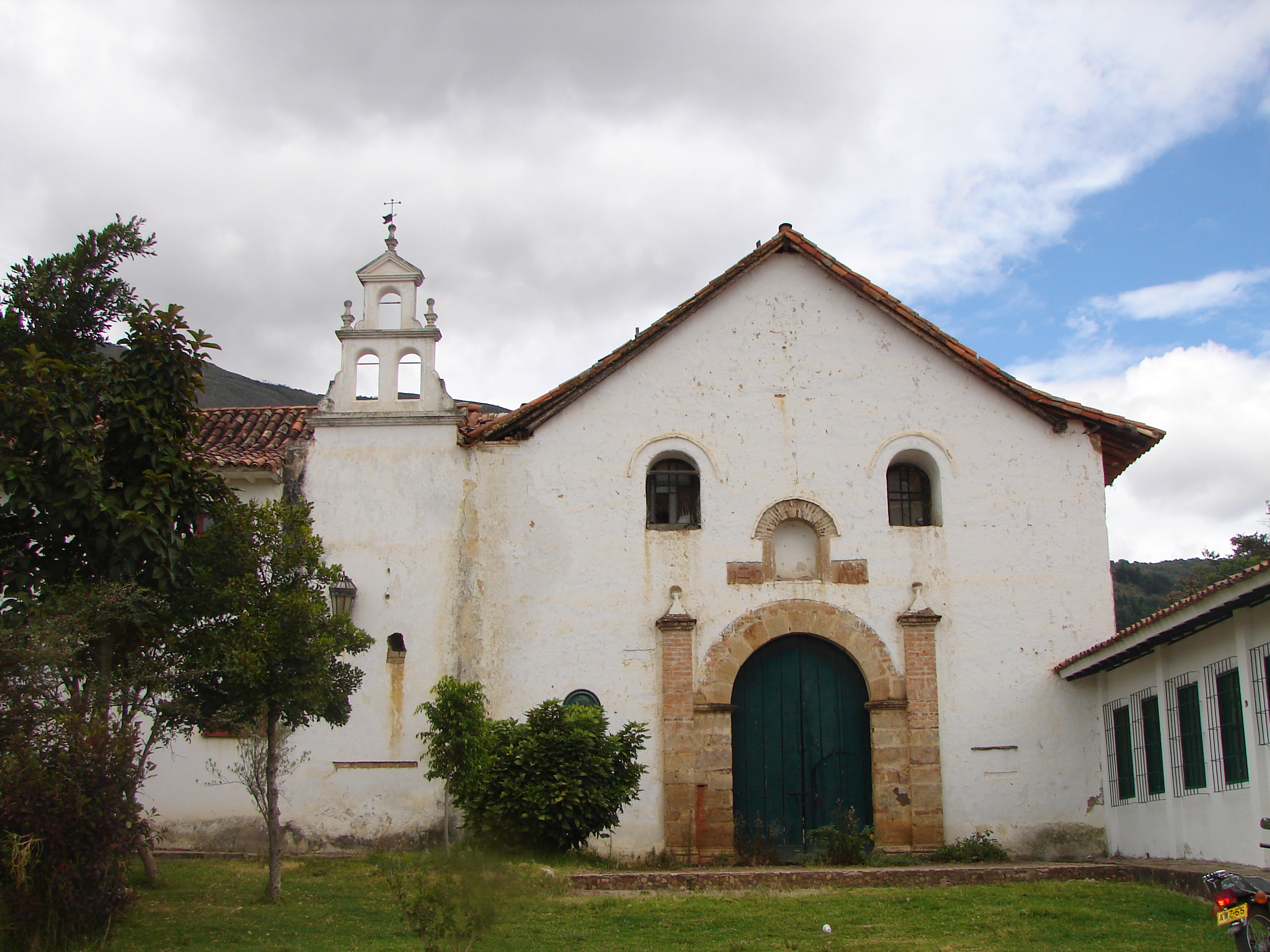 Iglesia del Hospital de Villa de Leyva Iglesia de san Francisco